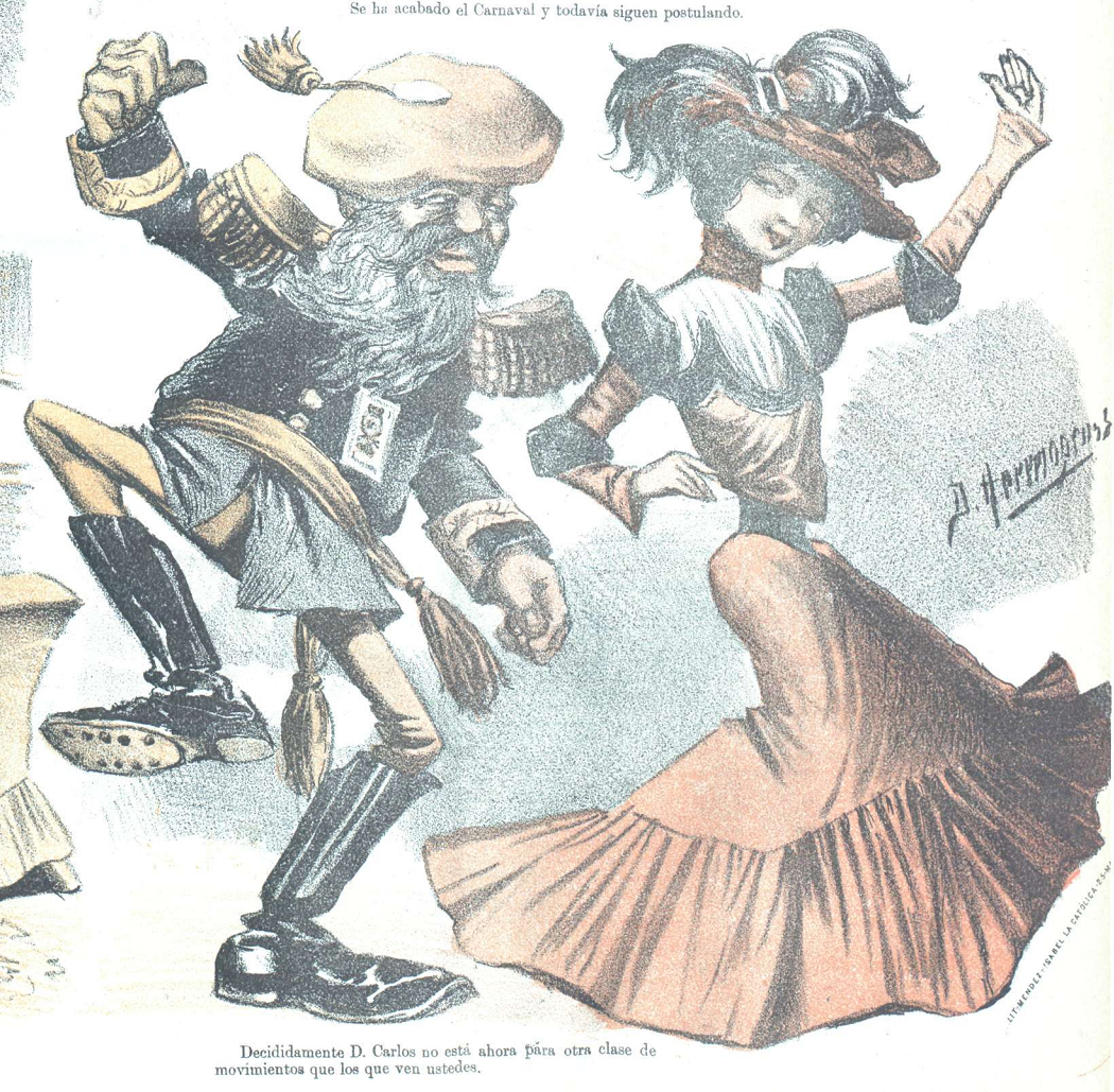 Caricatura.